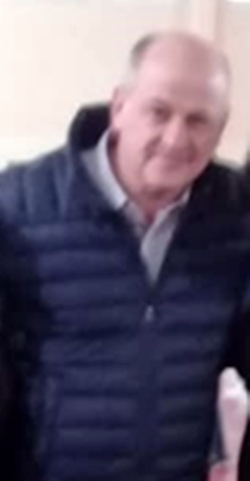 Mariano Cecilio Uset, intendente del partido de Coronel Rosales.